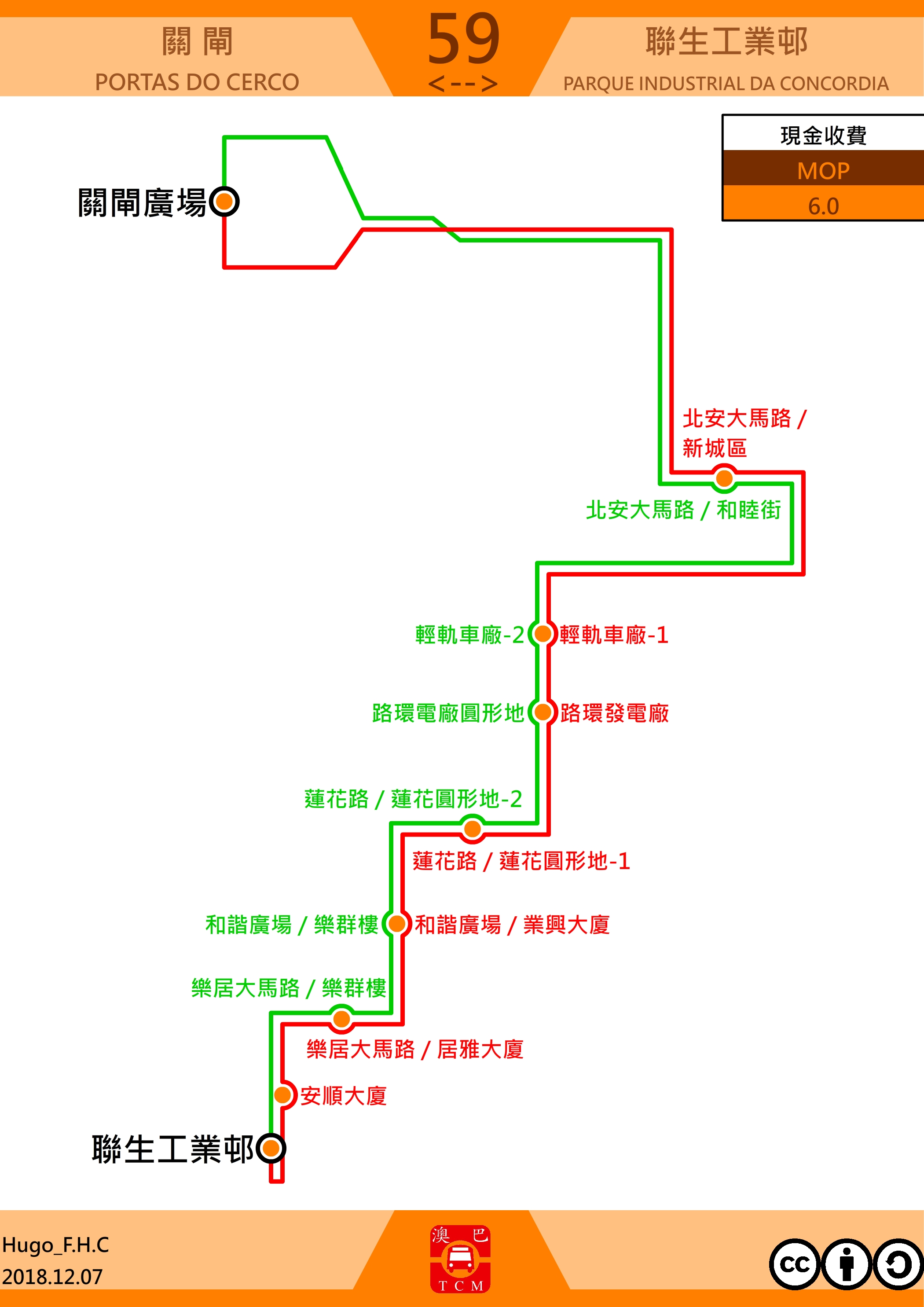 澳門巴士59走線圖